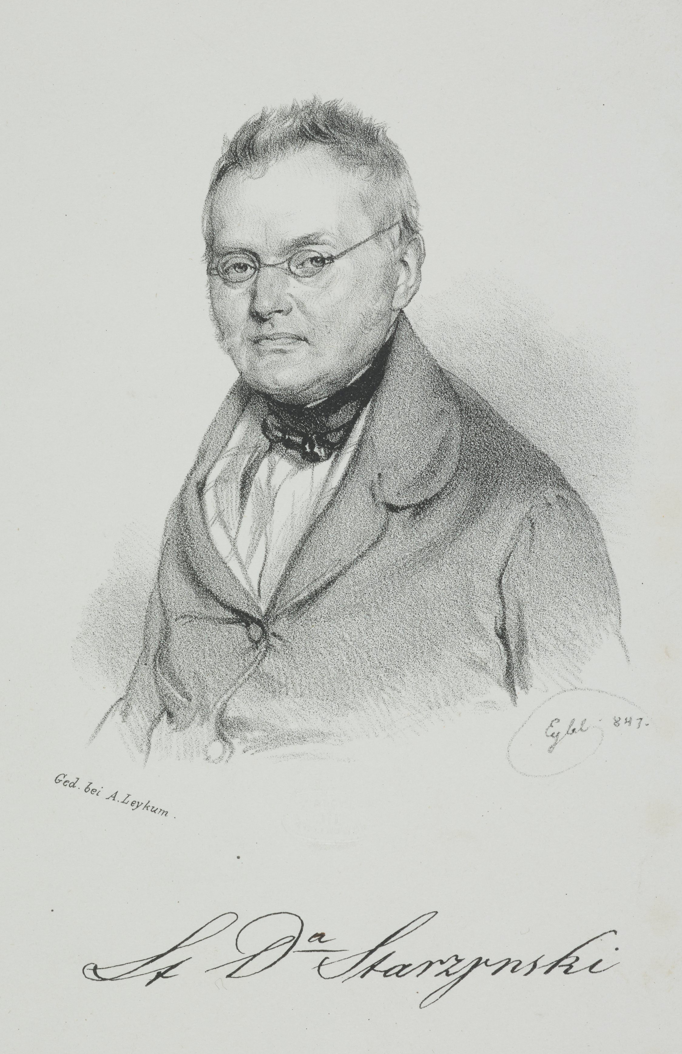 Stanisław Doliwa Starzyński